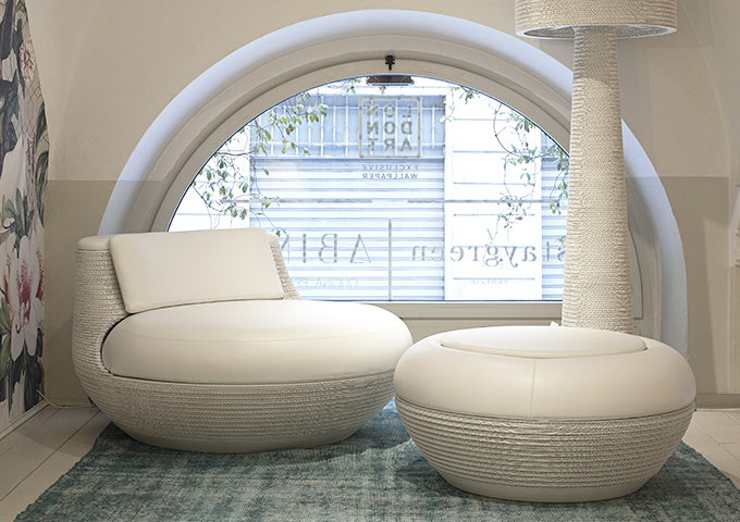 BOTTO